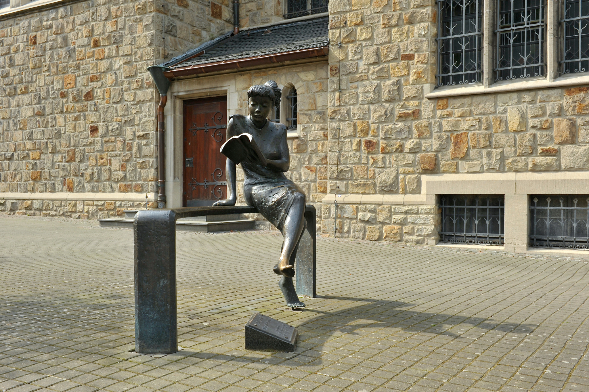 'Die lesende' (het leesmeisje) van de Duitse kunstenaar Jürgen Ebert.